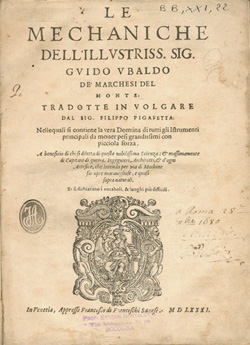 Le mechaniche dell'illustriss. sig. Guido Vbaldo de' marchesi Del Monte: tradotte in volgare dal sig. Filippo Pigafetta nelle quali si contiene la vera dottrina di tutti gli istrumenti principali da mouer pesi grandissimi con picciola forza ..., In Venetia, appresso Francesco di Franceschi senese, 1581